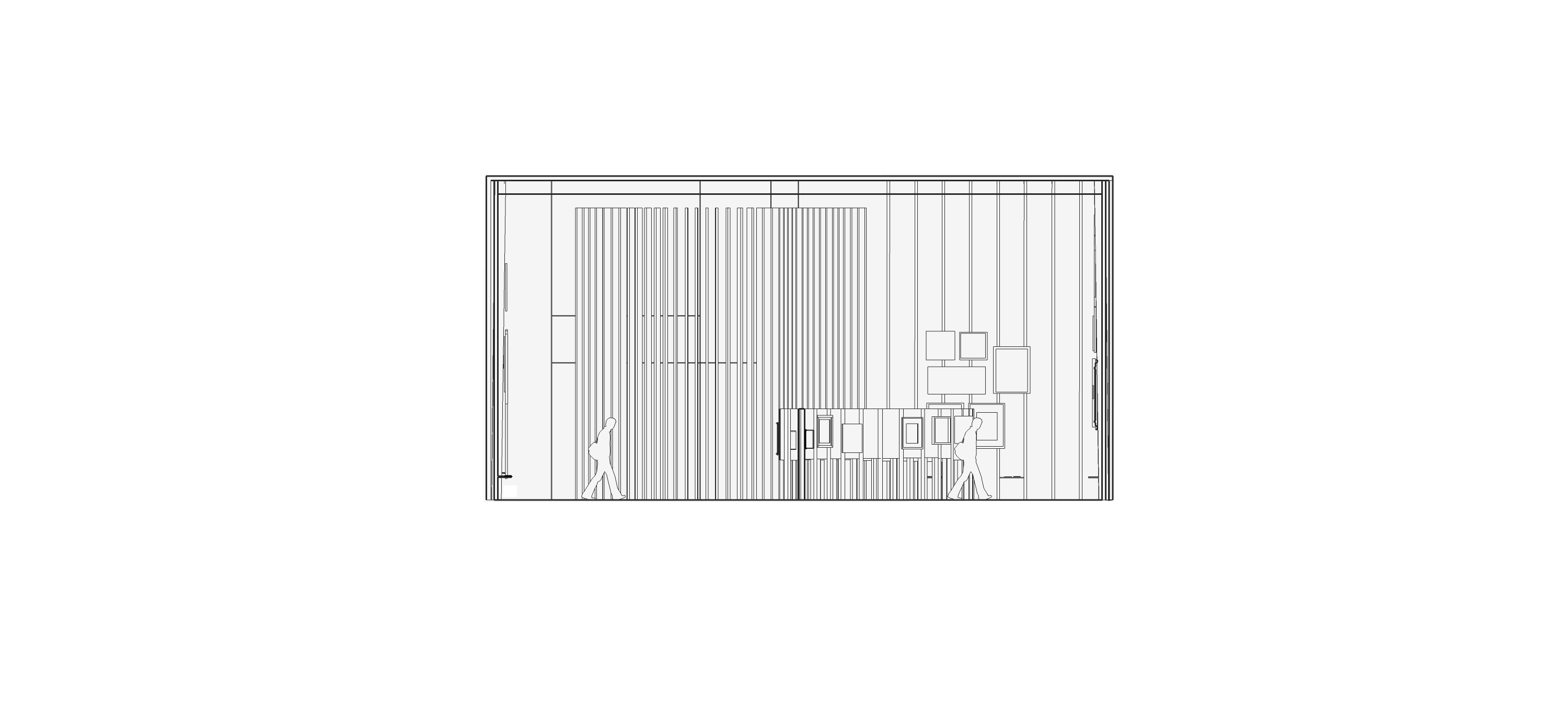 Template:Screenshotcopyrighted